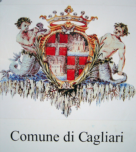 la croce sabauda è argento su campo rosso: qui appare azzurra; analogamente per il cielo sopra il castello